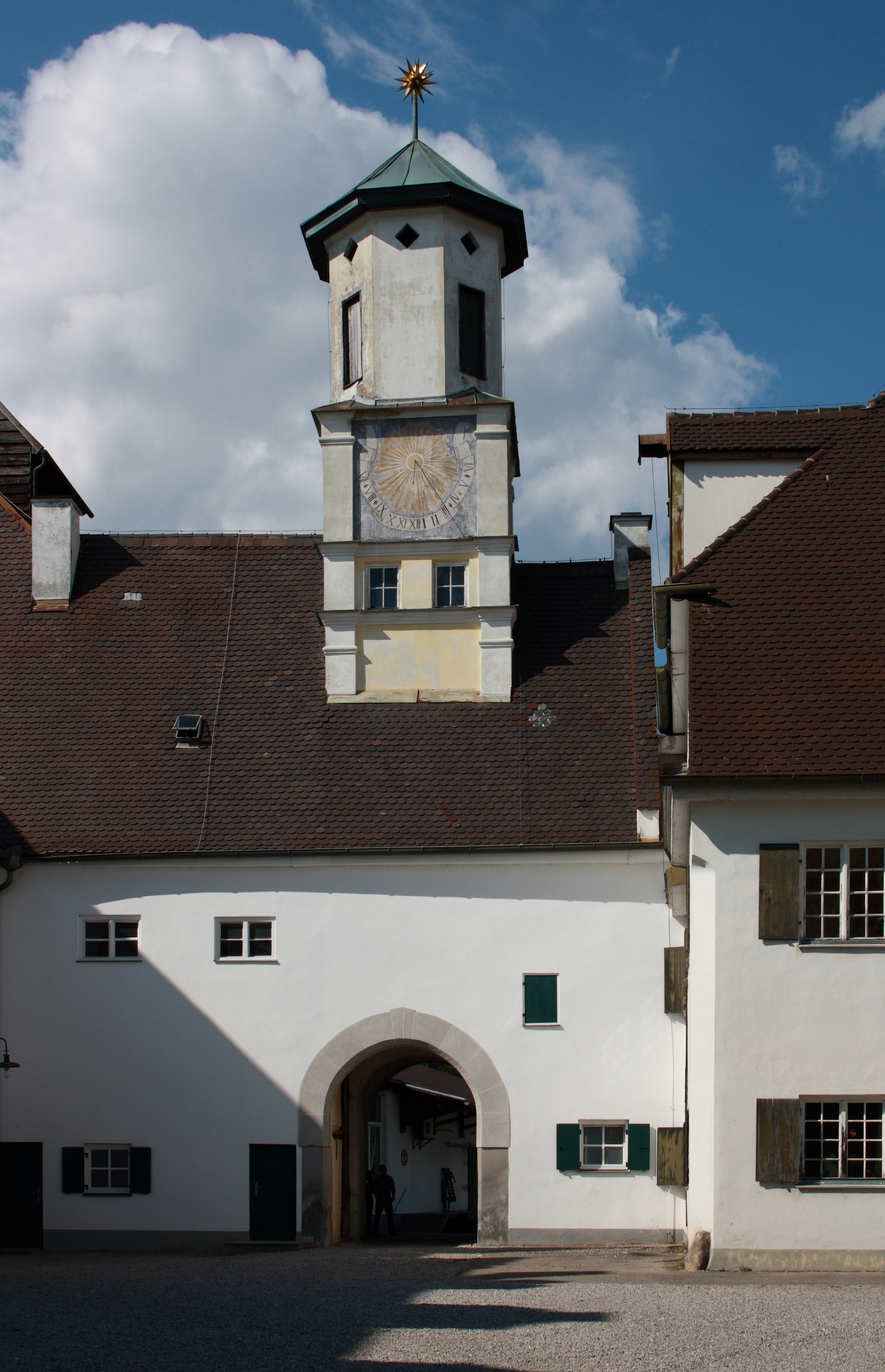 Schloss Scherneck in Rehling, einer Gemeinde im Landkreis Aichach-Friedberg (Bayern)